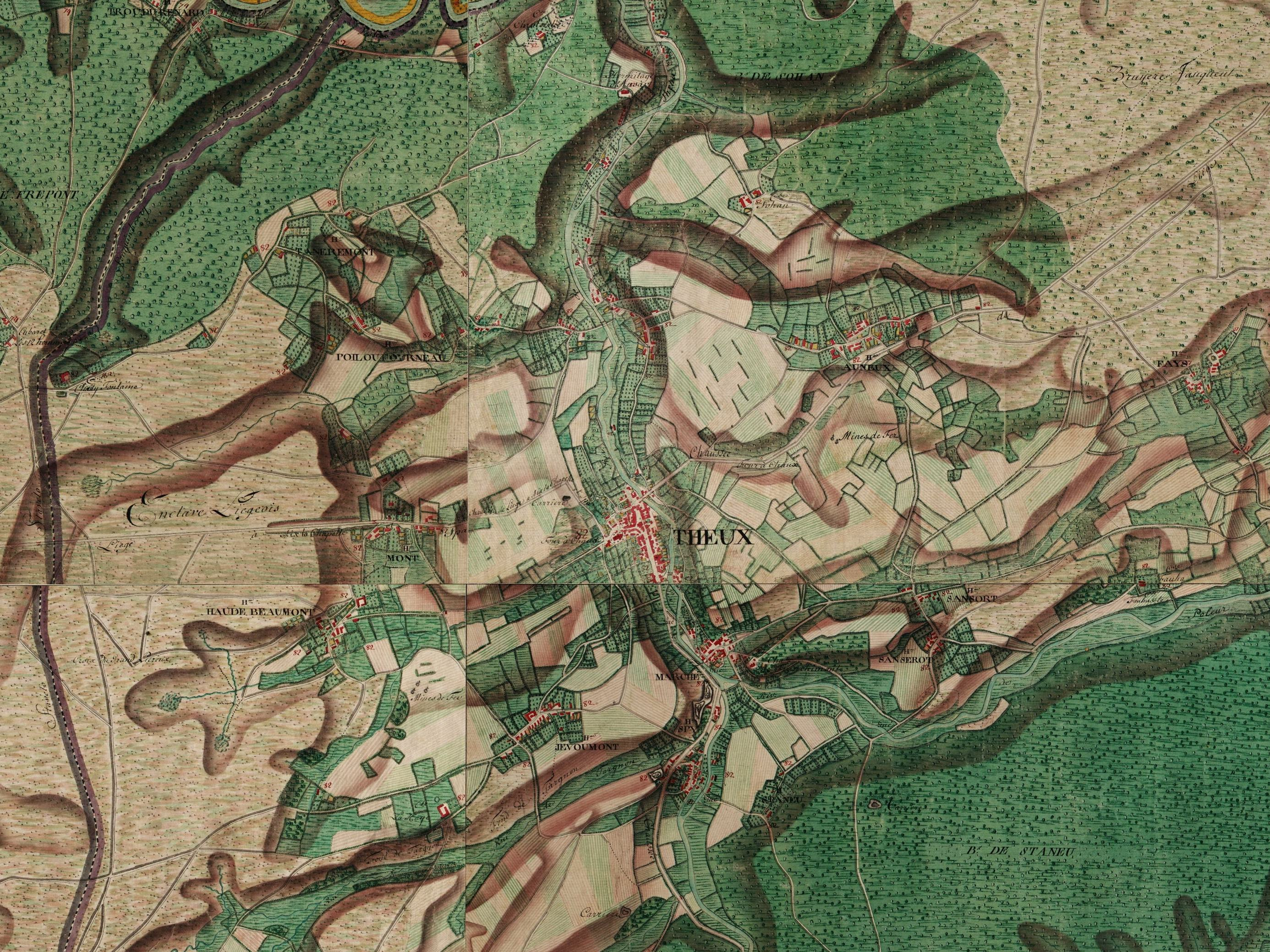 La carte des Pays-Bas autrichiens est une carte historique établie entre 1770 et 1778 par le comte Joseph de Ferraris, sur commande de Charles de Lorraine. Il s’agit de la première cartographie systématique et à grande échelle, dans toute l’Europe occidentale. Dessinée à la main par des élèves officiers, la carte de Ferraris compte 275 planchettes et avait une vocation exclusivement militaire : elle retraçait les éléments stratégiques les plus importants comme des rivières, des ponts ou des chemins creux permettant d'y cacher des troupes. La carte renseigne le relief, l'occupation du sol, l'habitat, le réseau routier et le réseau hydrographique, l'organisation paroissiale ainsi que les limites administratives de l'époque. L'ensemble des planches sont consultables sur le site de l'IGN, avec l'accord de la Bibliothèque royale de Belgique.